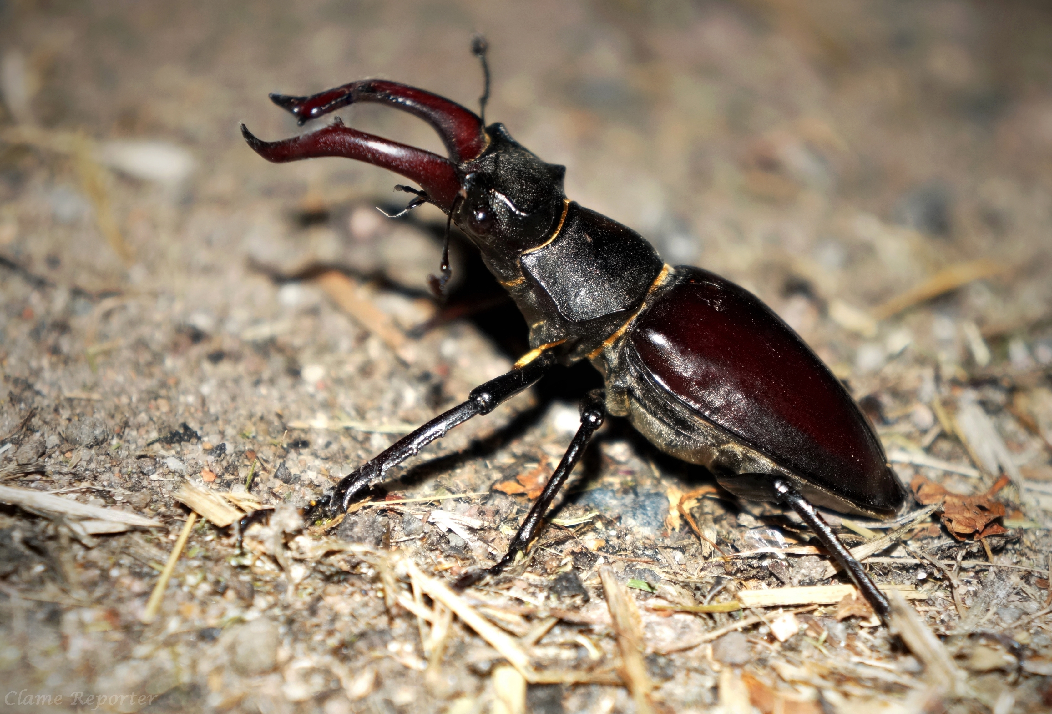 Lucane Cerf-Volant mâle en quête de femelle(s) pendant les nuits estivales de Juillet. Il opte ici pour une position d'observation au sol, mais il peut relever ses pattes avants et sa tête pour se préparer à la défense et ainsi éloigner toute(s) menace(s). Pour cela, il se sert de ses impressionnantes mandibules avec lesquelles il peut mordre, couper ou soulever ses proies/ses concurrents notamment en période de reproduction (Juillet généralement).